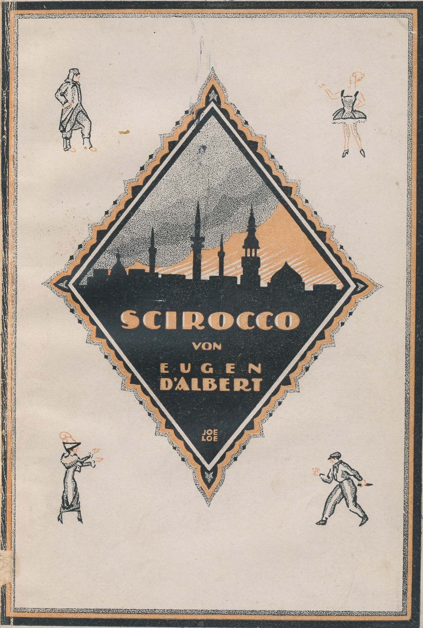 Illustration aus dem Textbuch von Scirocco.